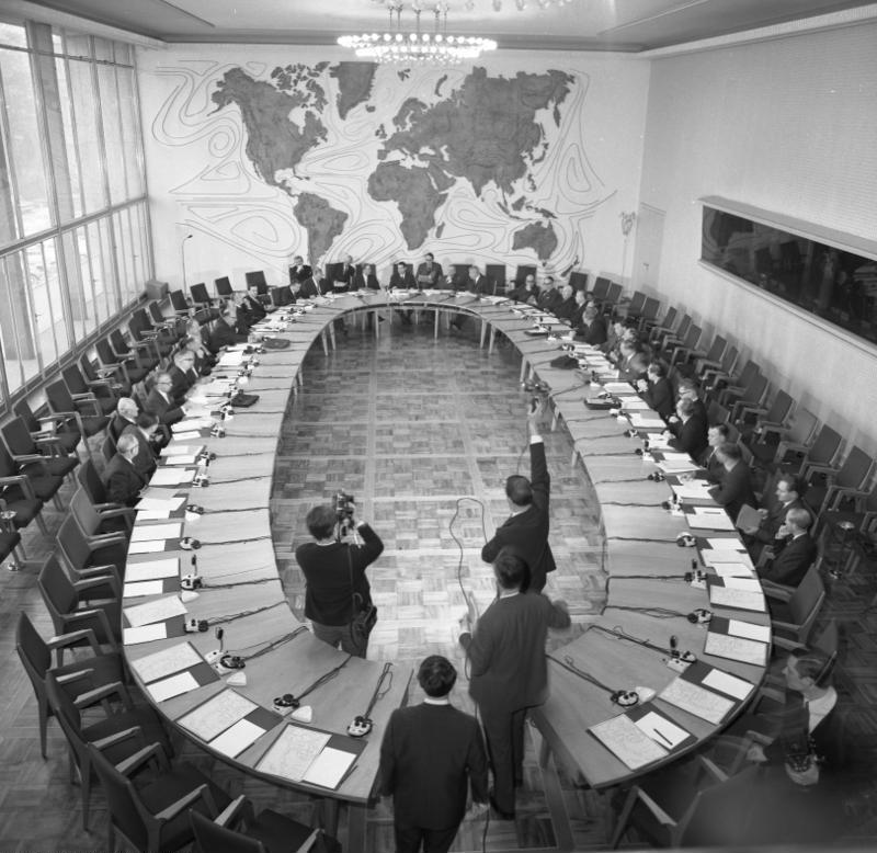 Konferenz der Botschafter aus Süd- und Ostasien. Auswärtiges Amt, Weltsaal (Unter Vorsitz von Dr. Gerhard Schröder)